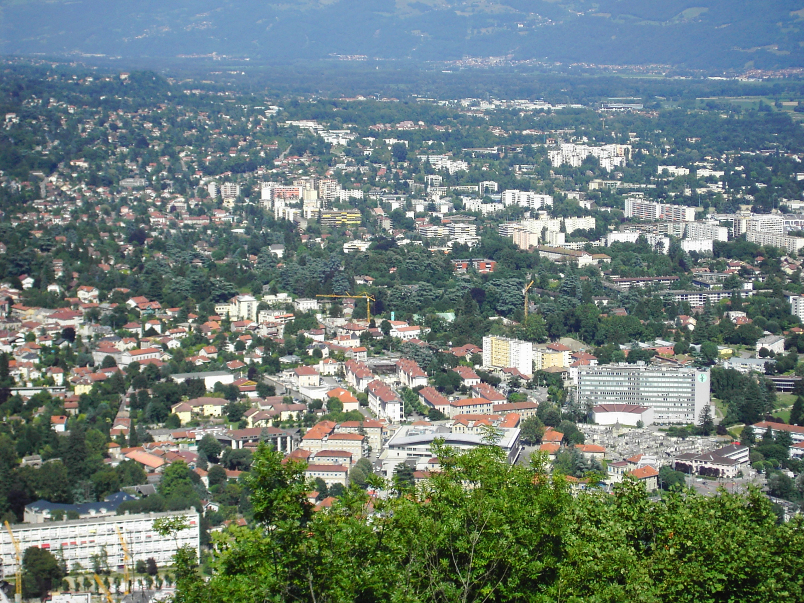 Vue de La Tronche et de Corenc depuis la bastille à Grenoble.